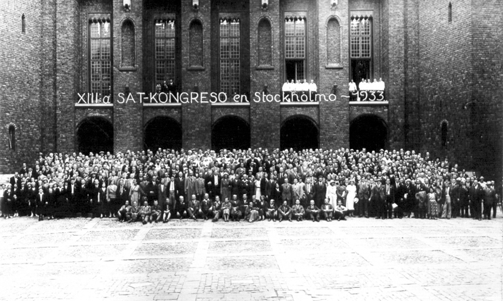 Komuna foto de partoprenantoj de SAT-kongreso en Stokholmo.